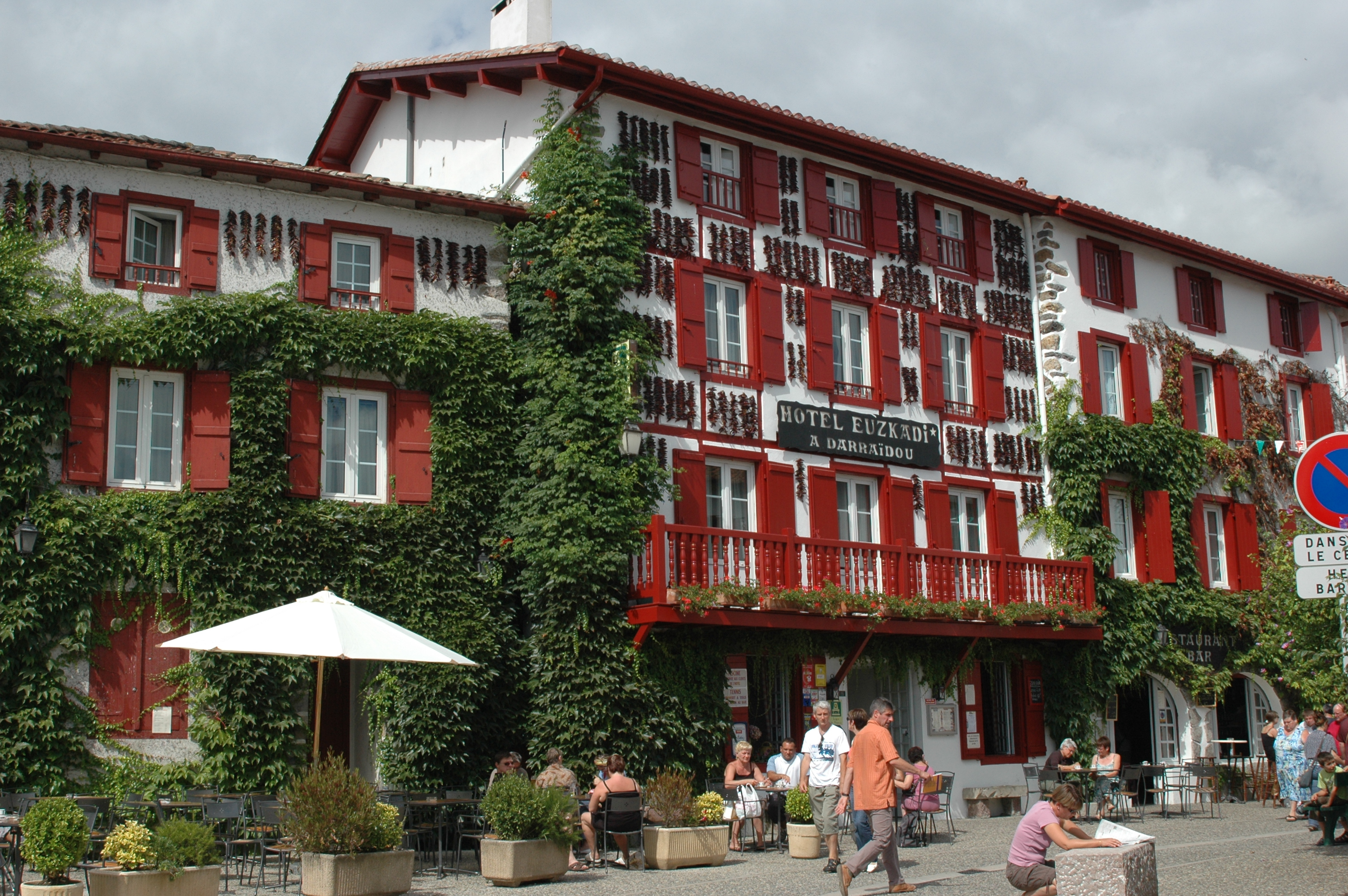 Espelette, façade couverte de piments. / Ezpeleta, piperrez estalitako etxea.